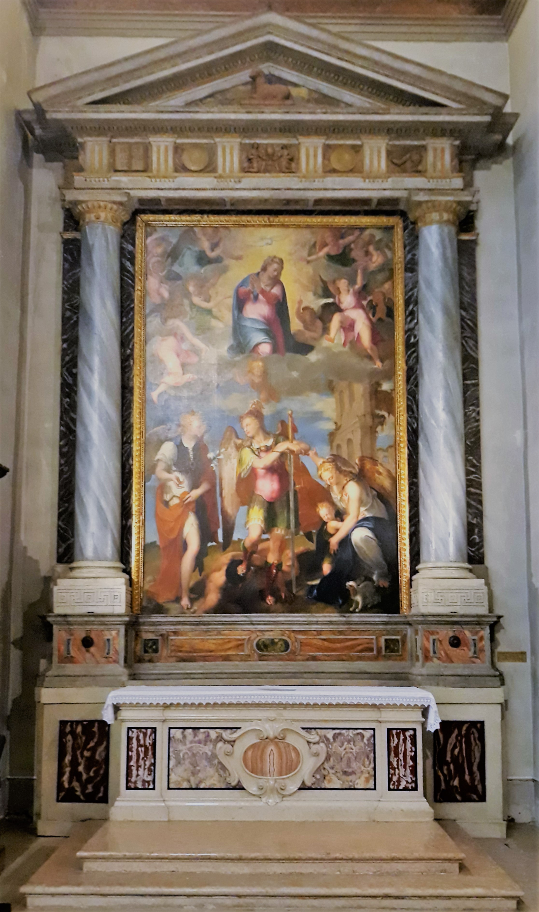 Altare laterale della chiesa di San Giorgio in Braida a Verona. La tela è del pittore veronese Felice Riccio, detto Brusasorzi, "I Tre Arcangeli"